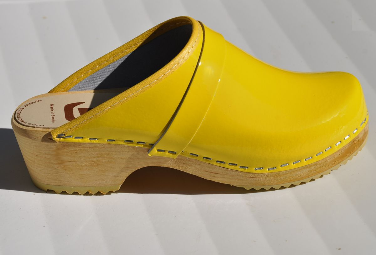 Sabots-scandibay jaune vernis fabrication suède, talon 4,5cm, bois de hêtre, forme standard